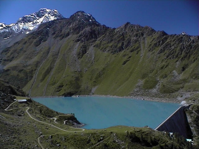 Lac de Cleuson, Kanton Wallis, Schweiz